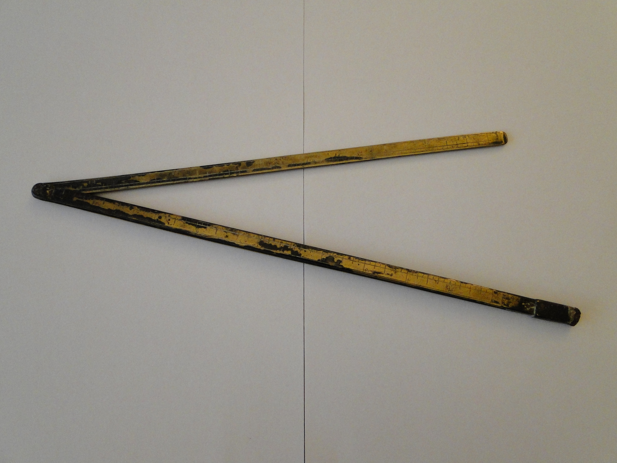 Klappzollstock aus Messing von 1869, 24-Zoll-Einteilung, vermutlich Hamburger oder Mecklenburg-Schwerinscher Zoll